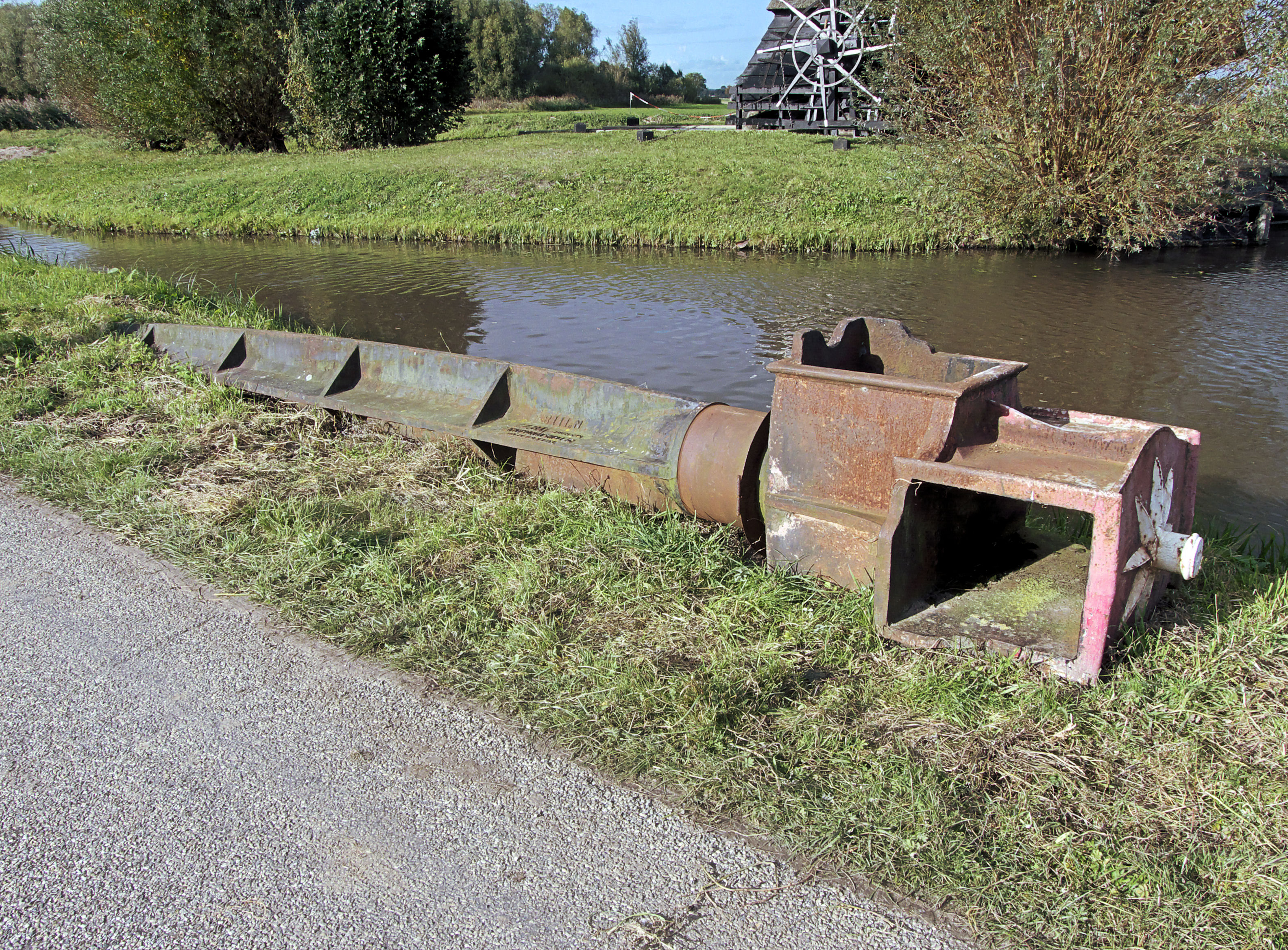 Noordeveldse molen, Dussen, Netherlands, oude bovenas Prins van Oranje